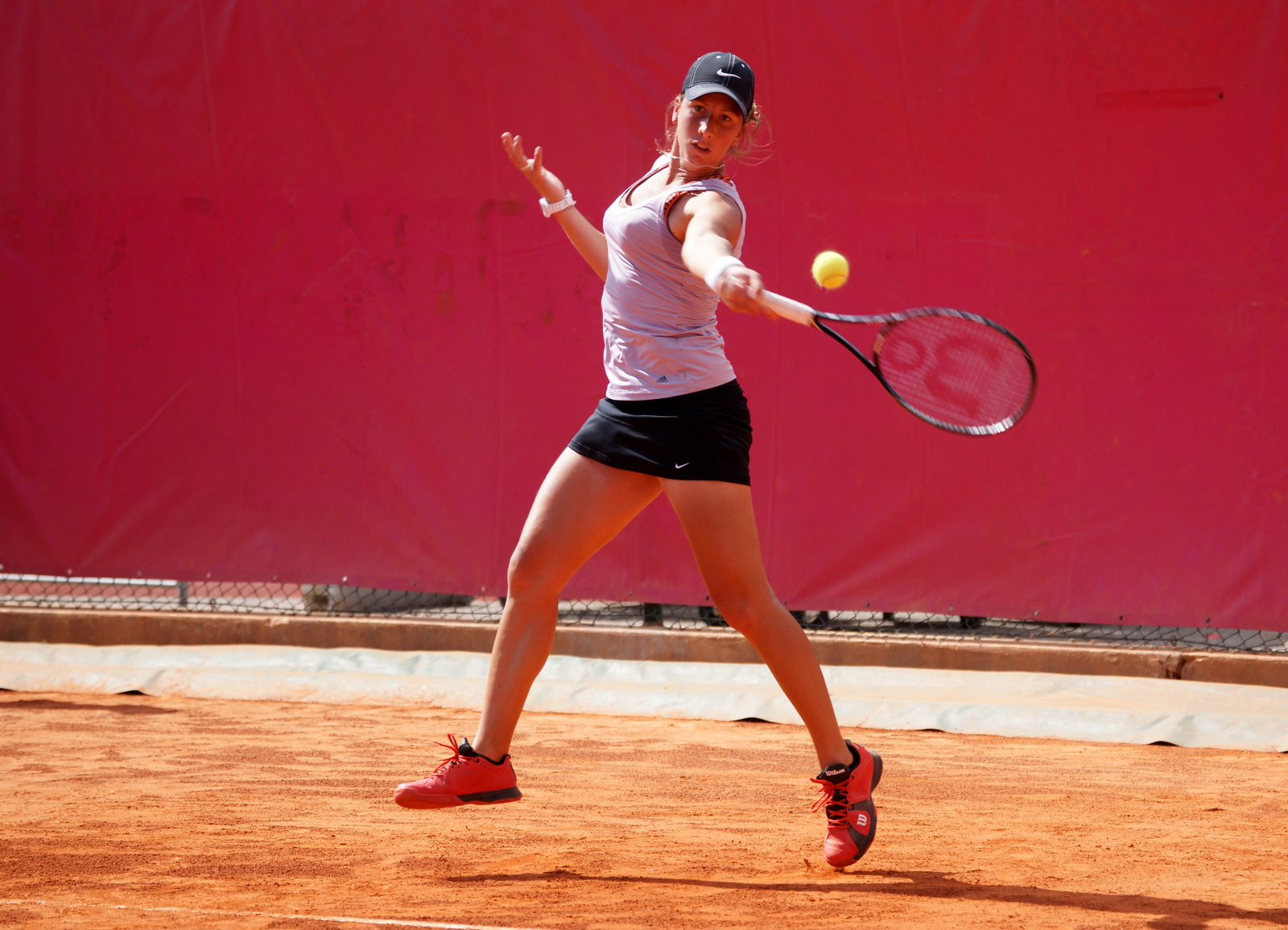 Tatiana Búa, Open ITF Cagnes-sur-Mer 2014